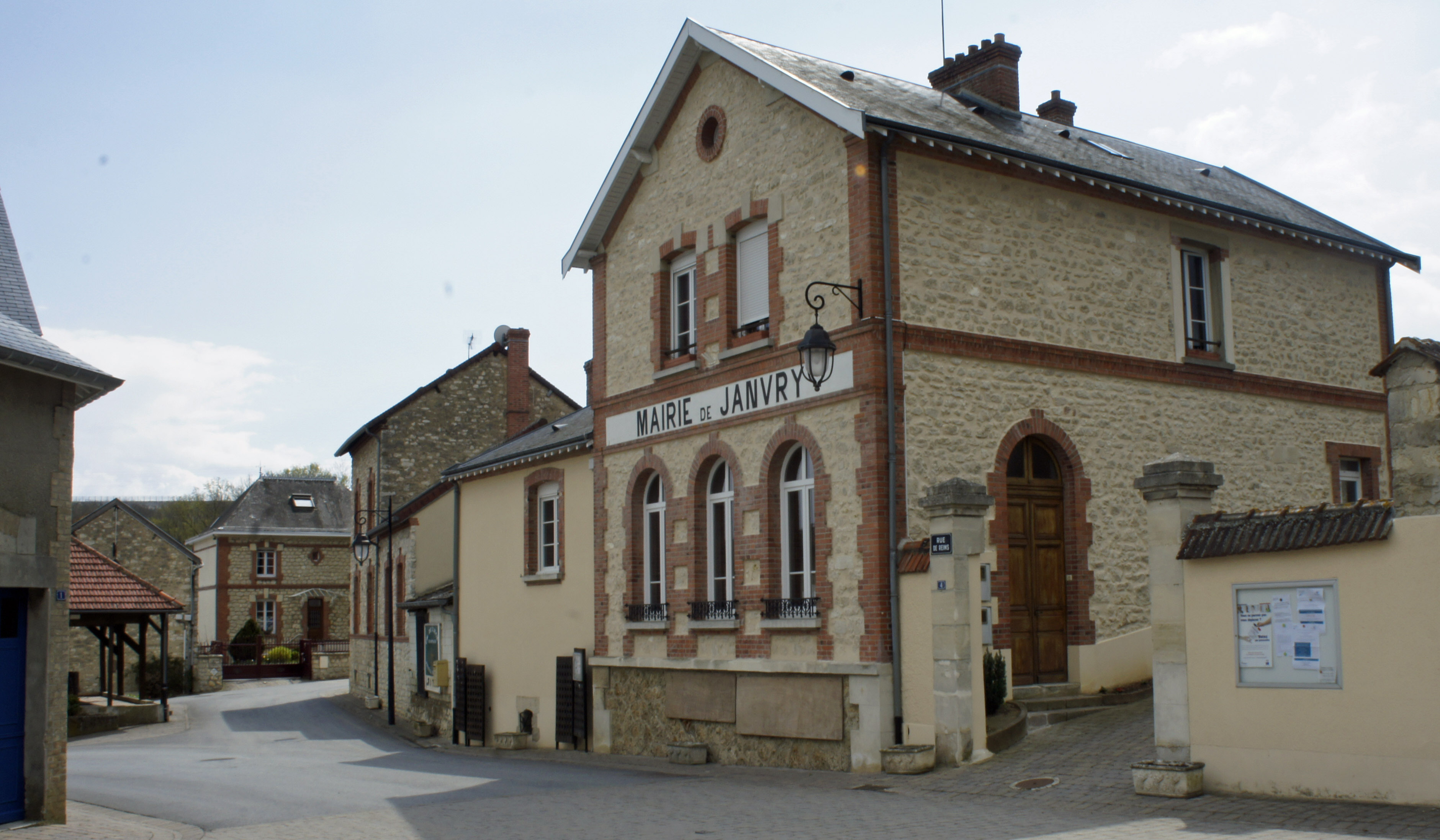 Mairie de Janvry.